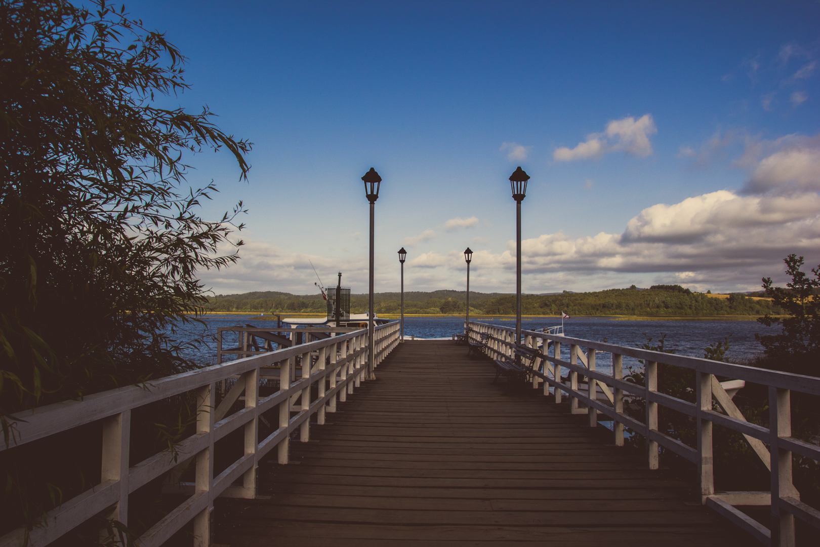 Punucapa, región de los ríos, Chile.